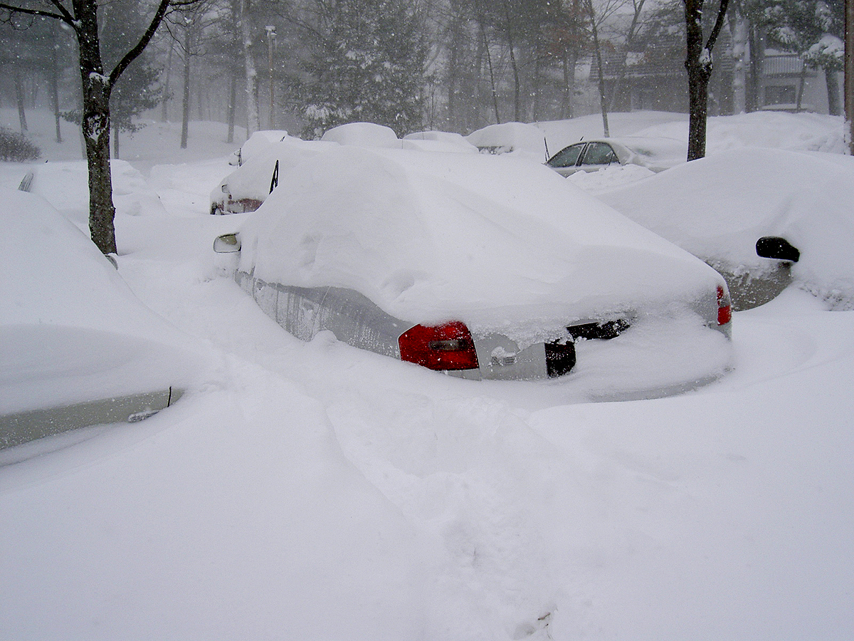 Feb 2013 blizzard in Boston